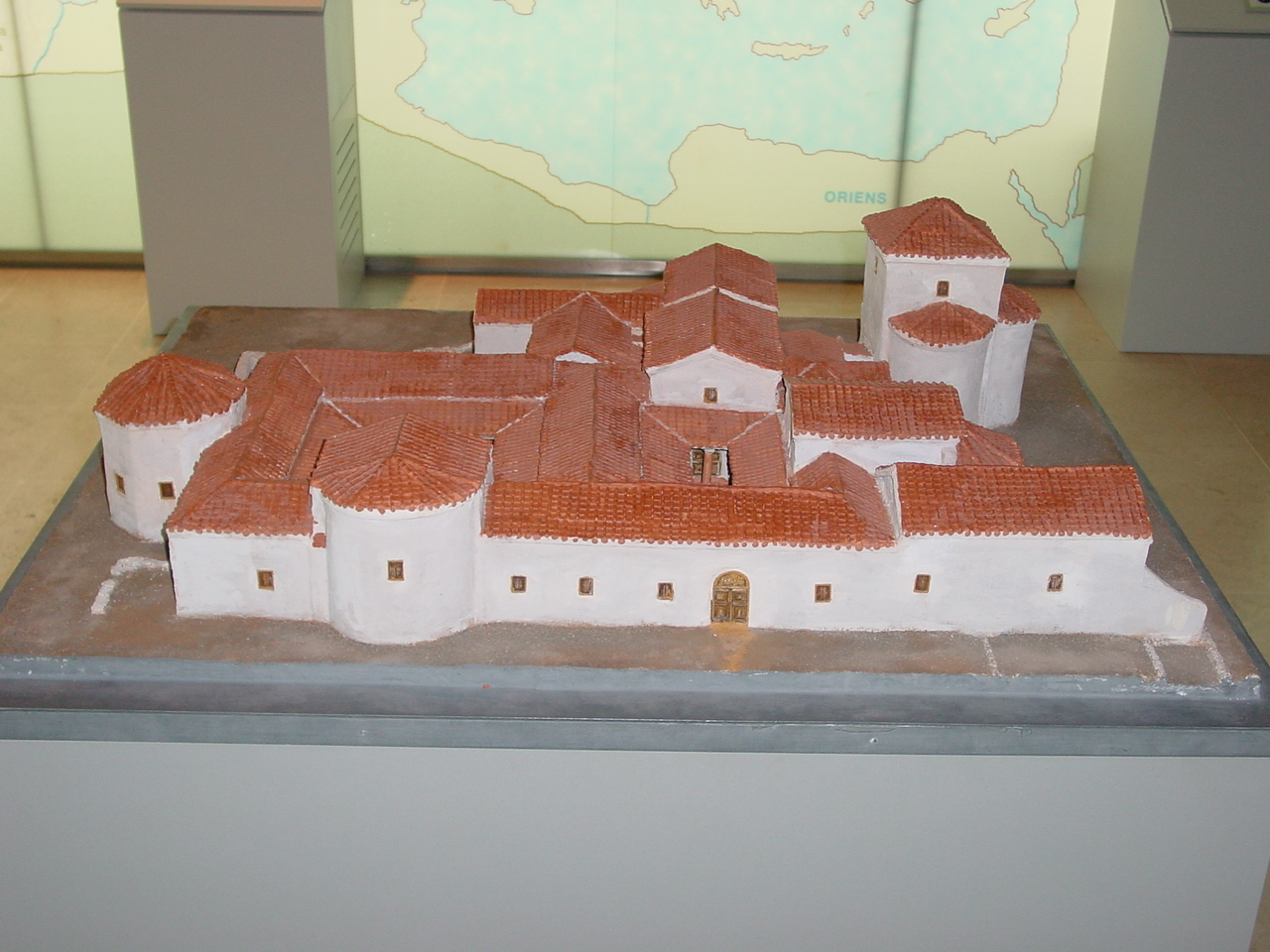 Villa romana de Almenara de Adaja, provincia de Valladolid (España). Maqueta y recreación de la villa, en el museo.